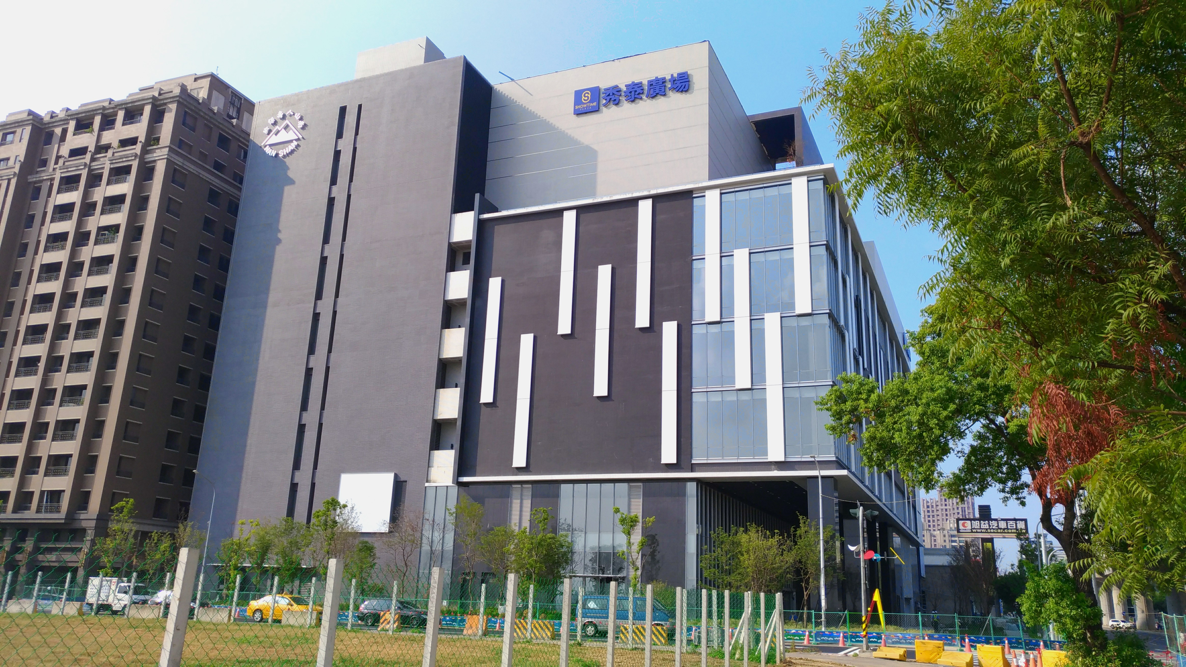 中文（台灣）: 台中秀泰廣場文心店